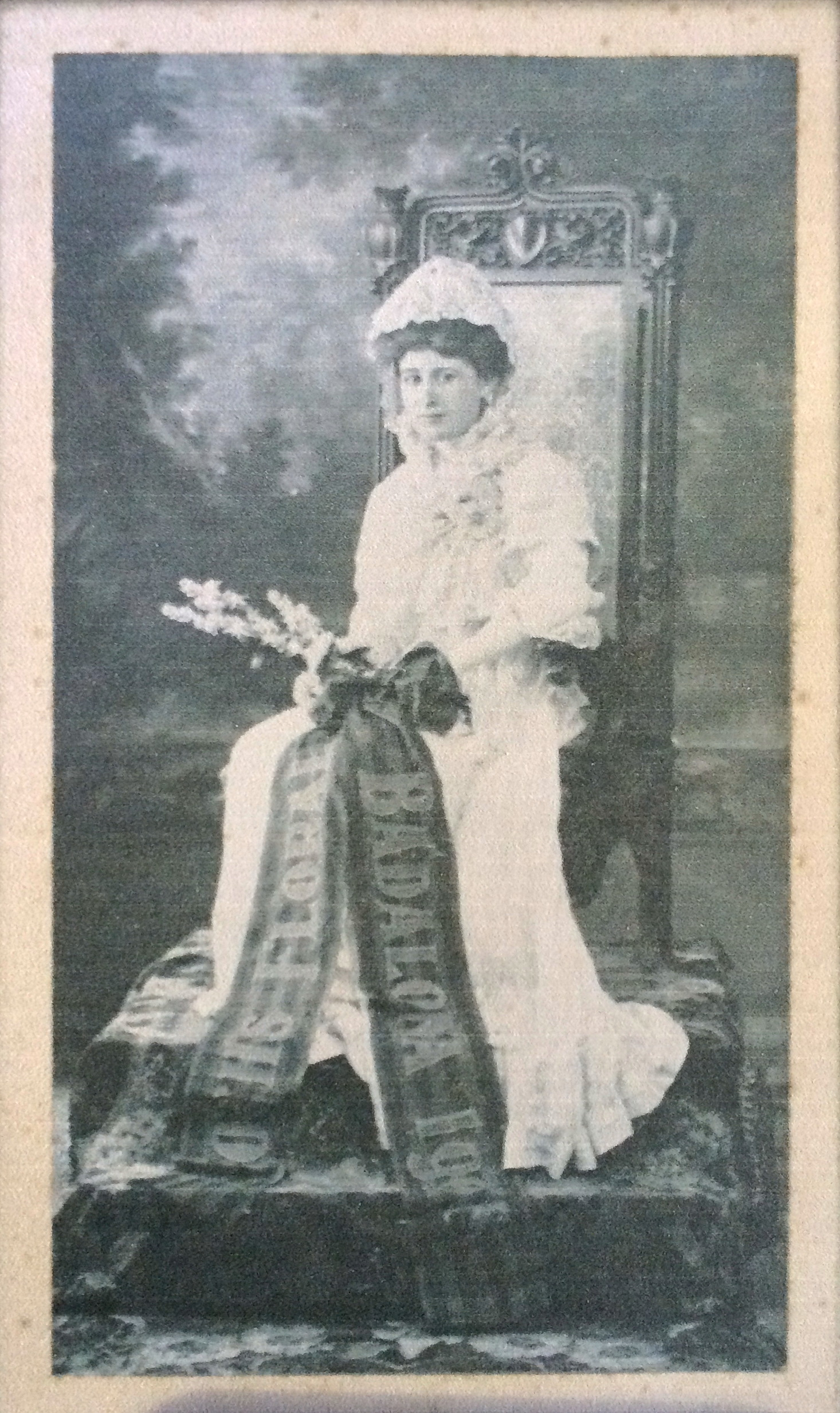 Orsina Baget (1888-1978), col·leccionista d'instruments musicals i esposa de Joaquim Folch i Torres, quan va ser nomenada "reina dels Jocs Florals de Badalona, el 1908.